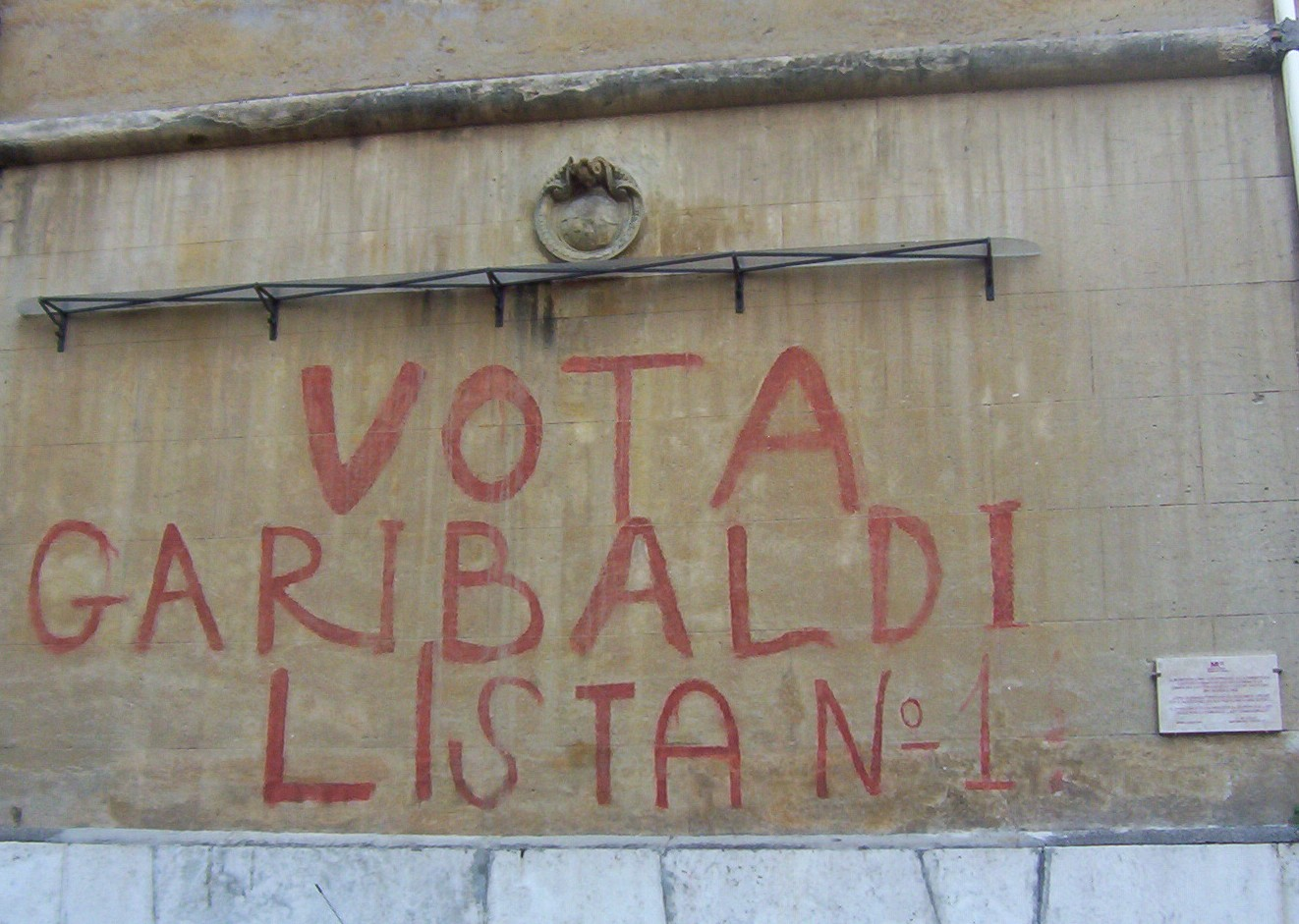 Roma. Garbatella. Graffito restaurato dal Municipio. Fronte popolare alle elezioni del 18 aprile 1948.